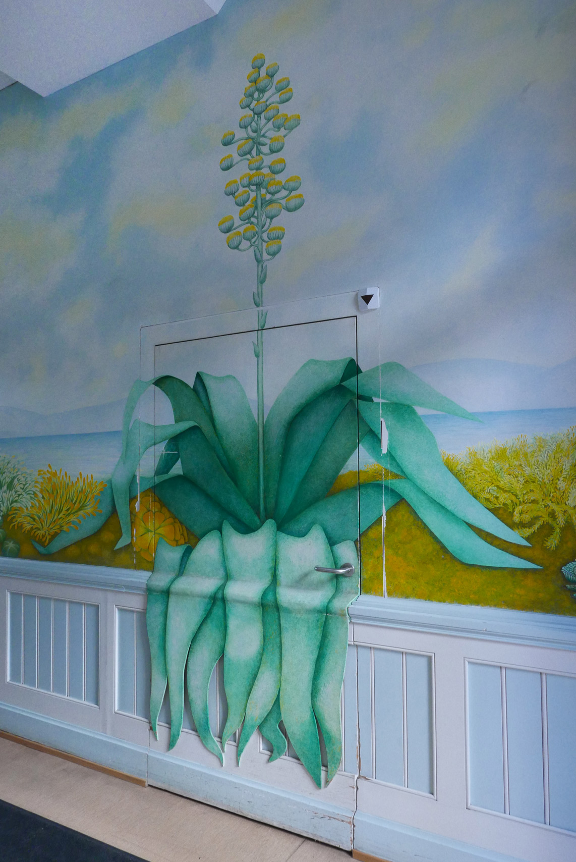 Karin Schaub. 1985, 1. Preis im Basler Kunstkredit-Wettbewerb, Wandbilder im Eingangsbereich des Instituts für Pflanzenphysiologie der Universität Basel.